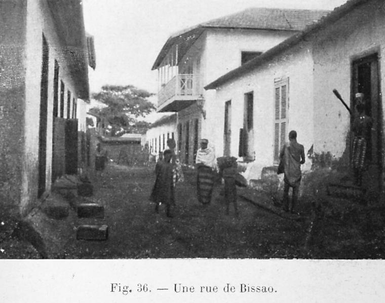 Une rue de Bissao